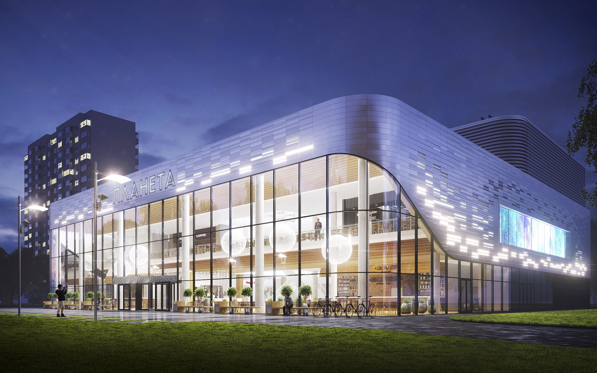 Дизайн-проект 2017 года. Планы по реконструкции заброшенного кинотеатра "Планета" в Москве